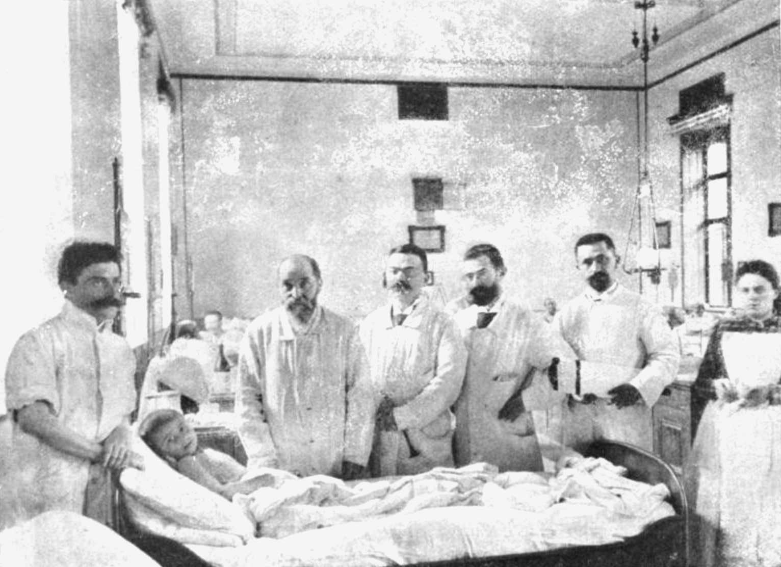 Leopold Oser, Abteilungsvorstand der Allgemeinen Poliklinik in Wien